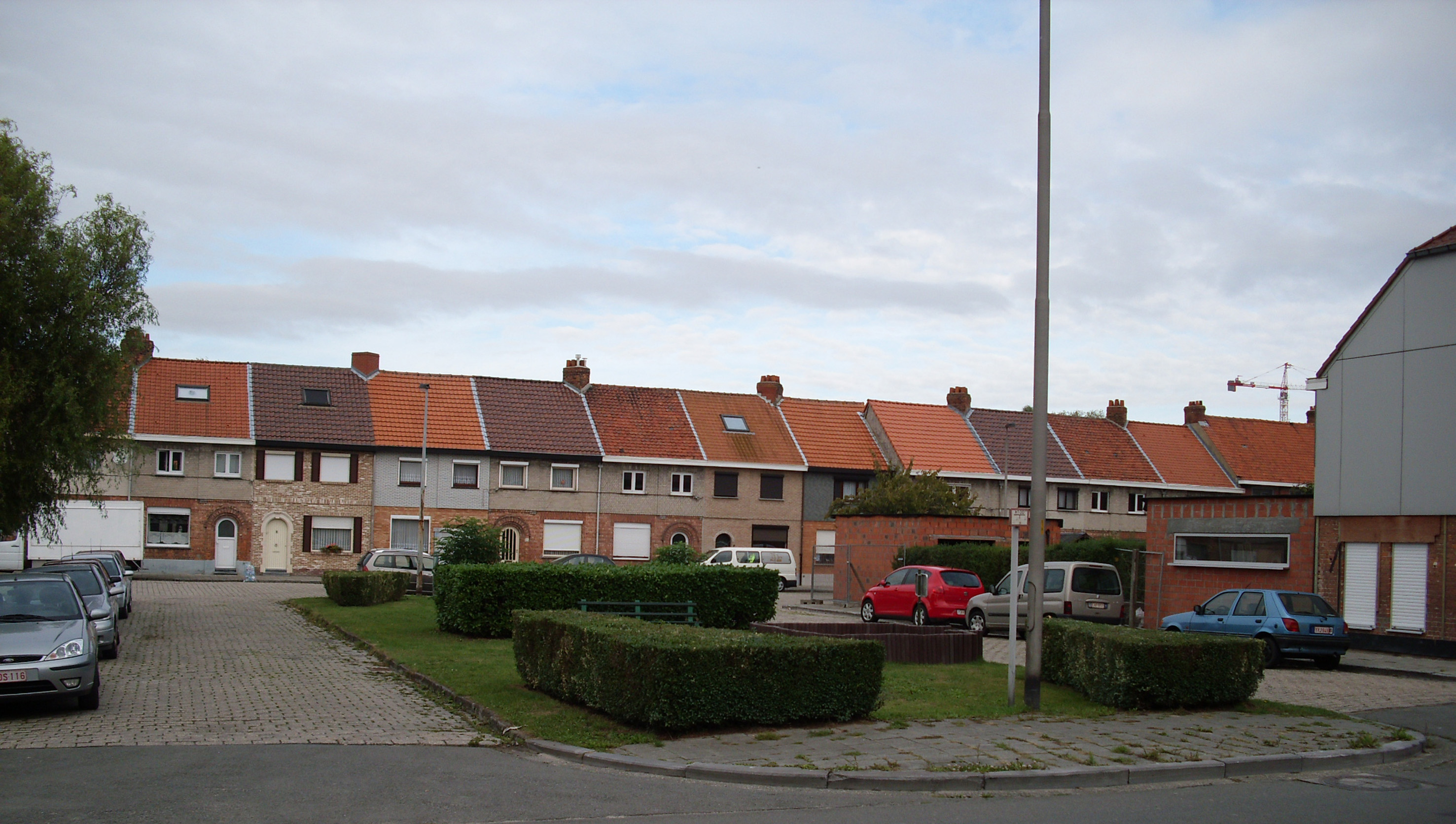 Louis of Lodewijk Roelandtplein - Nieuw Gent - Gent - Oost-Vlaanderen - Vlaanderen - België